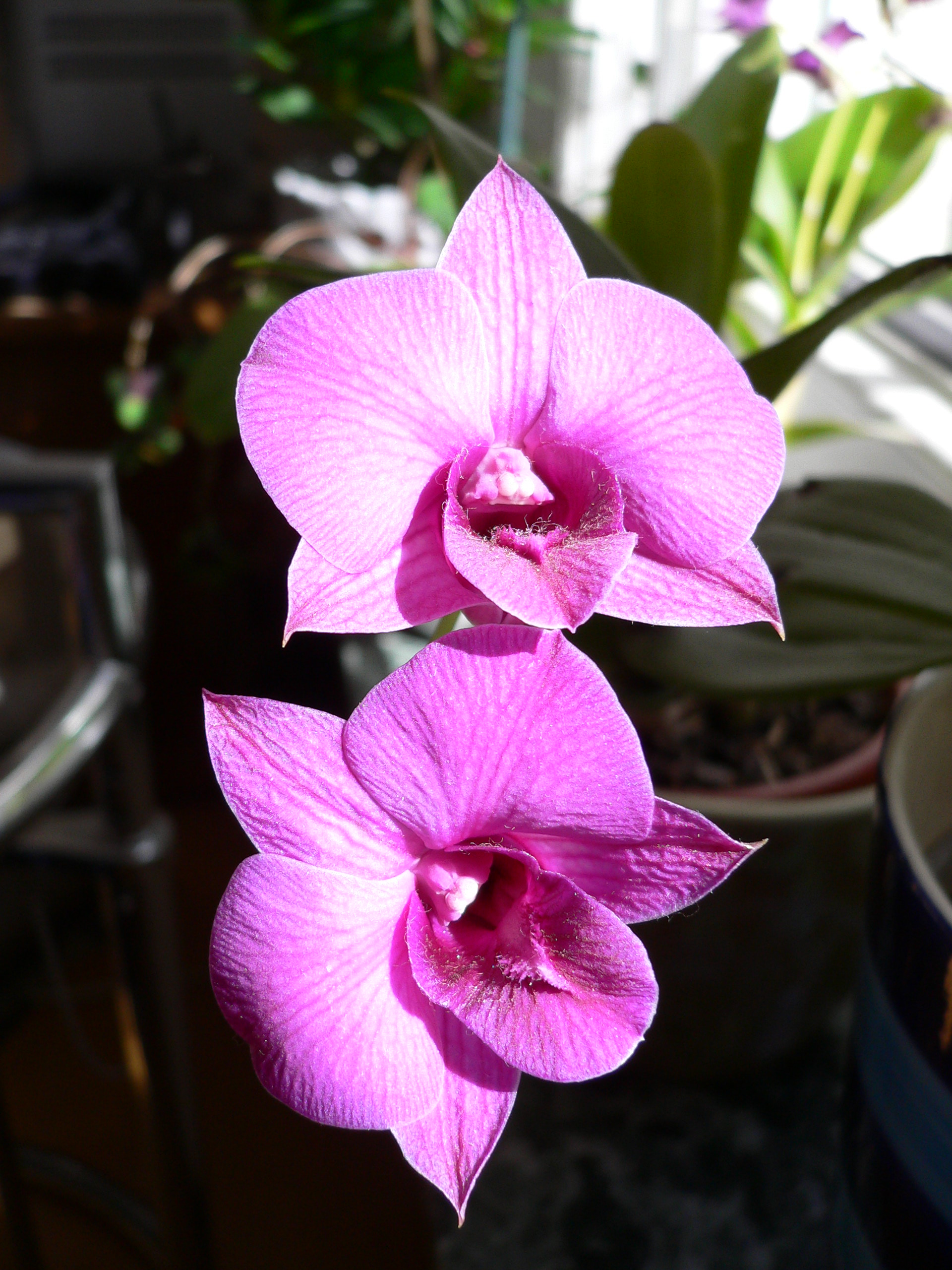 Doritis